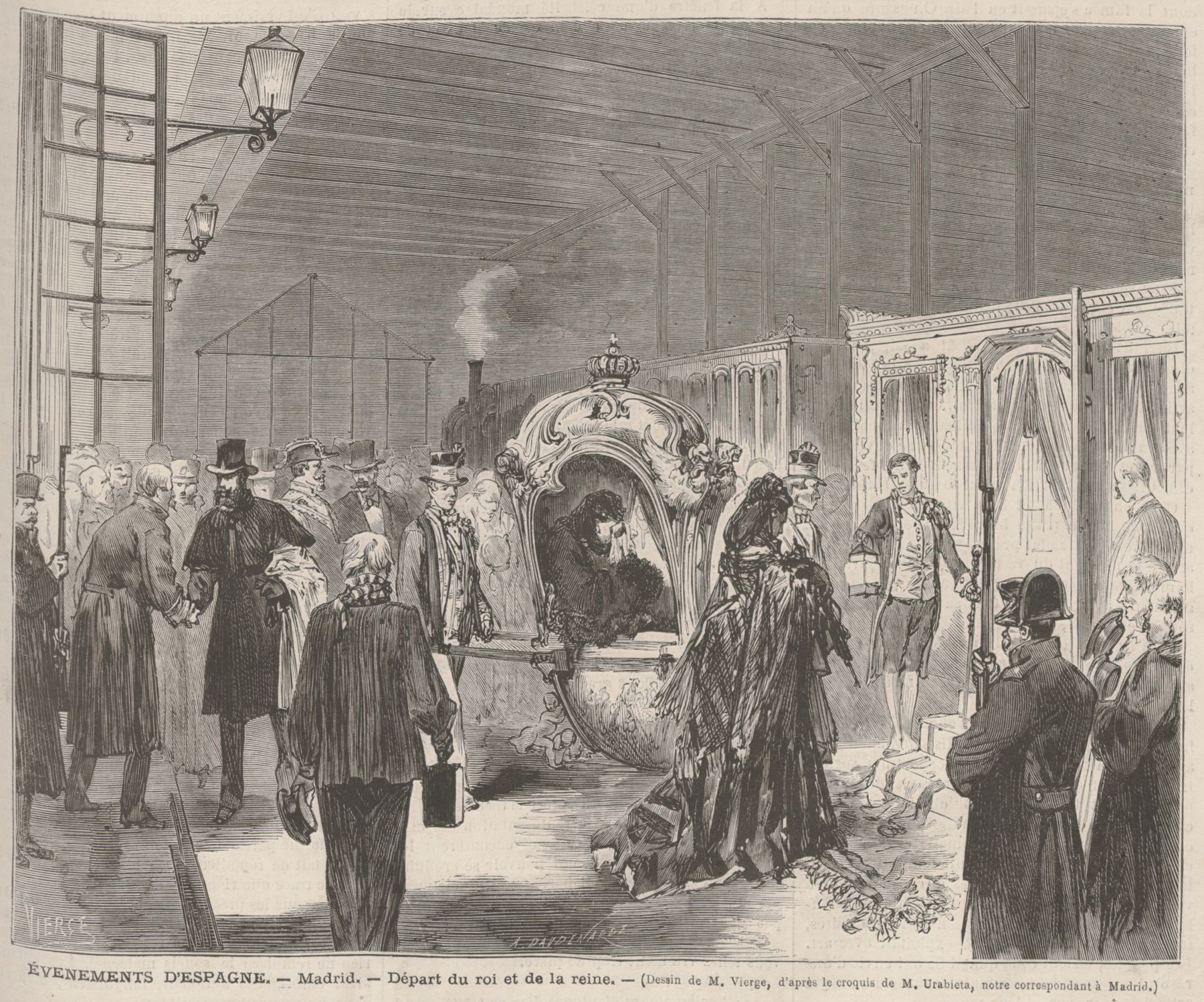 Évenements d'Espagne. — Madrid. — Départ du roi et de la reine. — (Dessin de M. Vierge, d'après le croquis de M. Urabieta, notre correspondant à Madrid.)